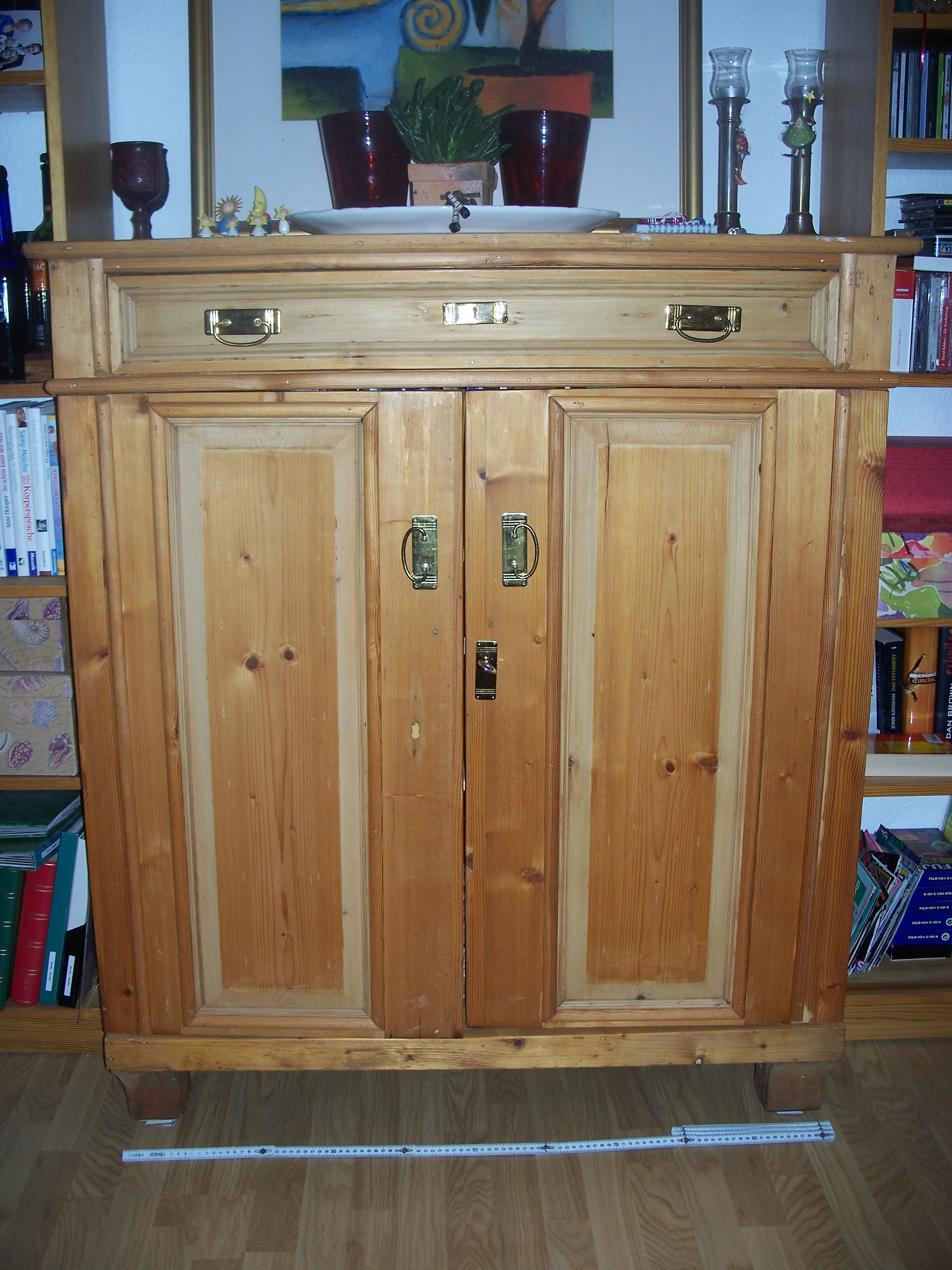 Typischer Vertikow aus Weichholz